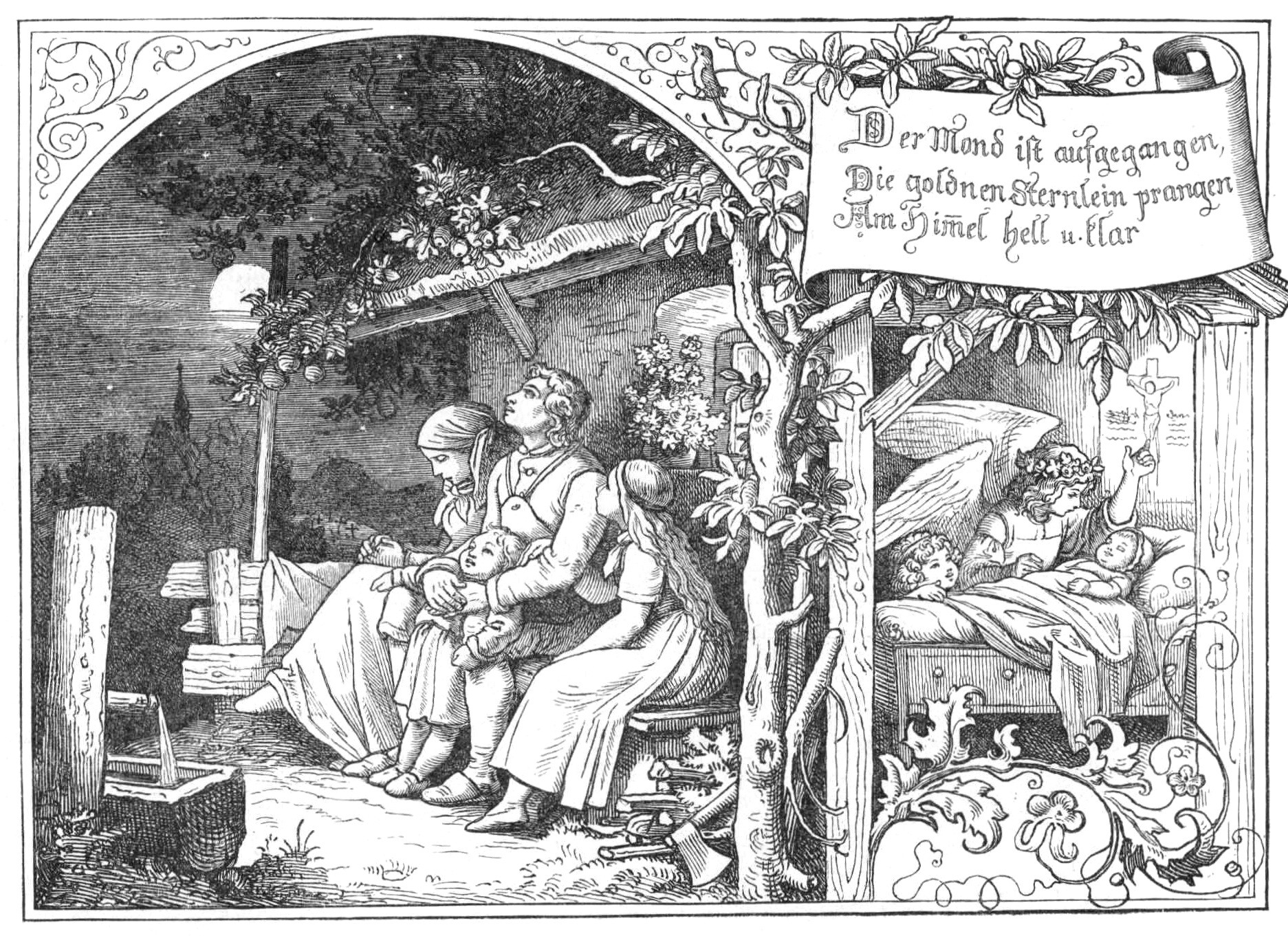 Der Mond ist aufgegangen. Aus: „Vater Unser in Bildern“.